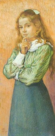 Portrait de la jeune Ida Braun (1891-1926), fille d'Alexandre Braun, future Baronne de Sadeleer